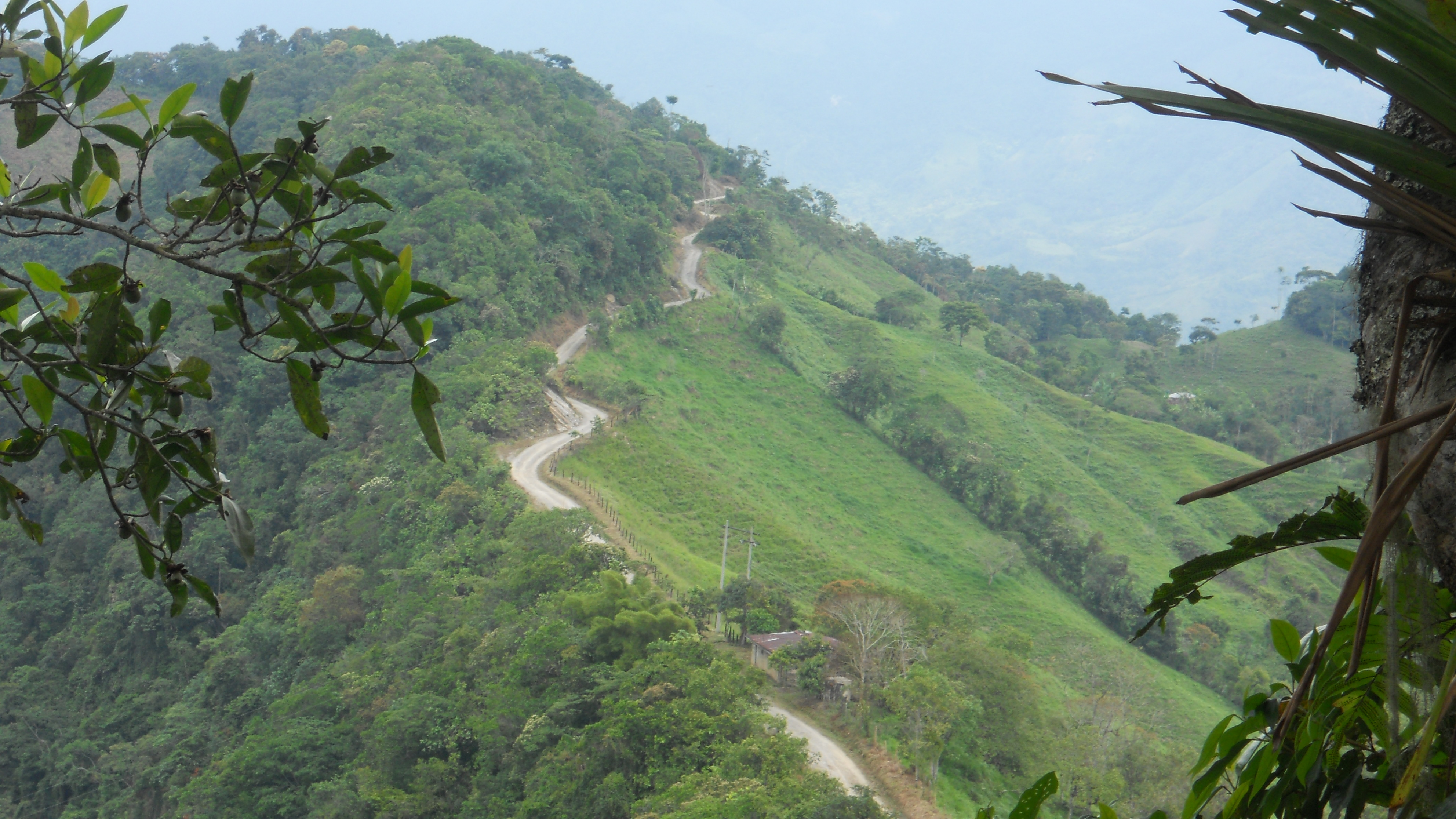 paisajes